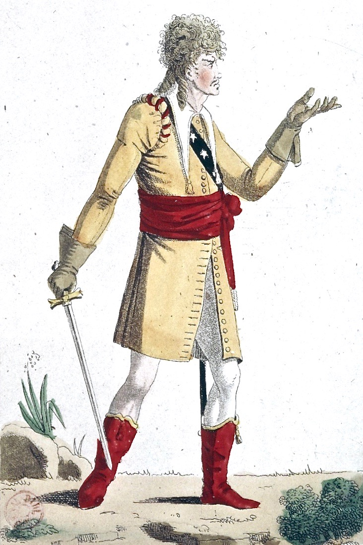 Der Schauspieler Joigny in der Rolle des überführten Brudermörders Conrad comte d’Esenbach im Melodram "Les Chevaliers du Lion" von Sophie de Saint-Simon (später de Bawr) am Théâtre de l’Ambigu-Comique in Paris (1804). Kolorierter Kupferstich, 23 x 14,5 cm. Bibliothèque nationale de France.